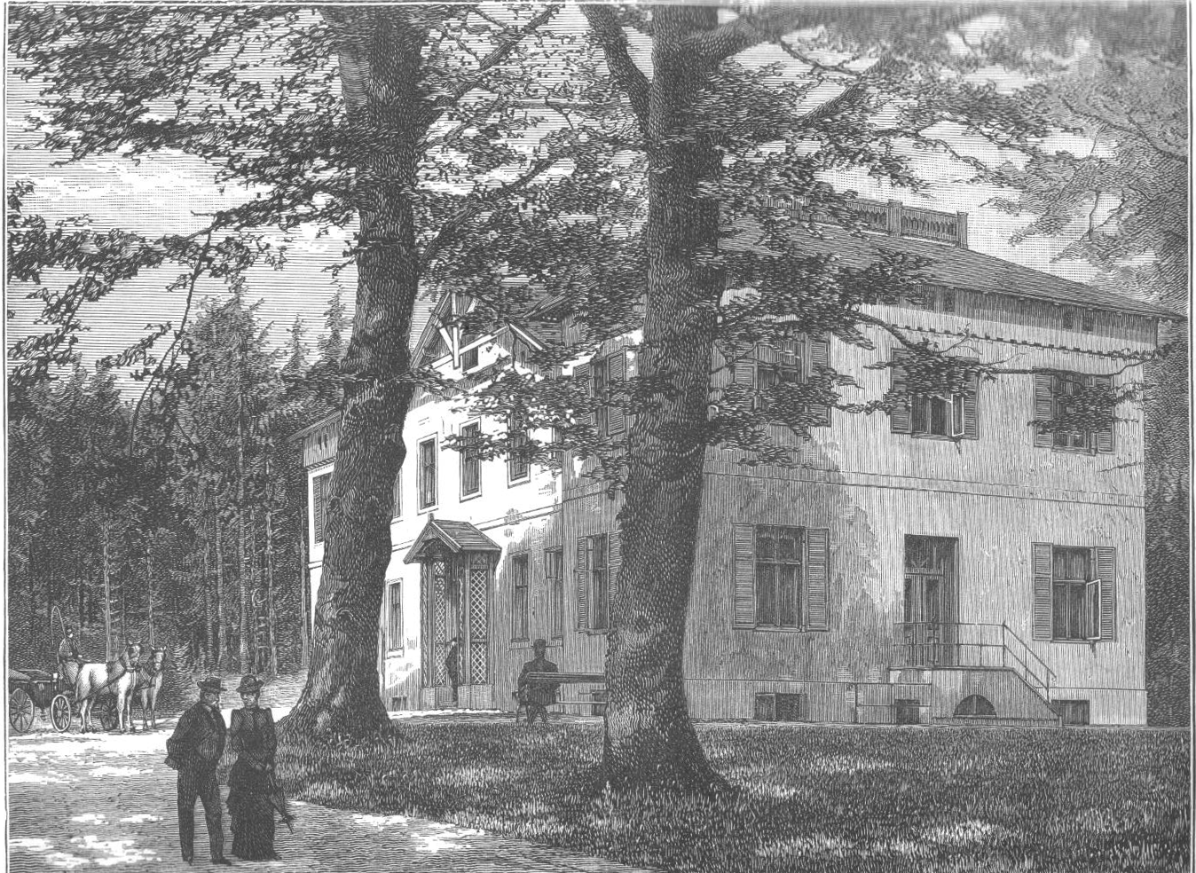 Silkeborg Vandkuranstalt. Opført i Vesterskoven ved Silkeborg efter Tegning af Prof. Dahlerup og aabnet i Sommeren 1883.